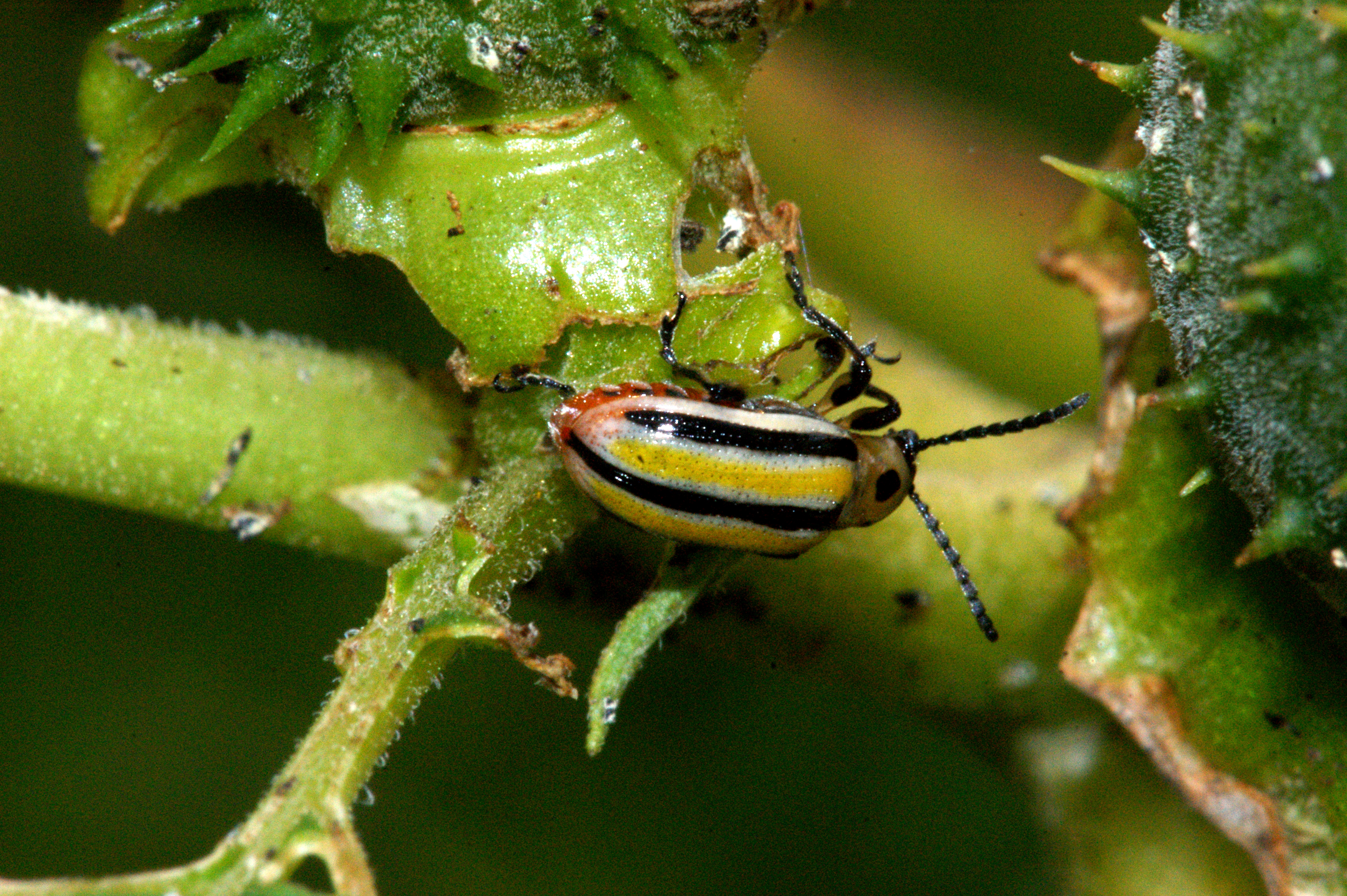 Lema daturaphila, chrysomèle rayée de la pomme de terre